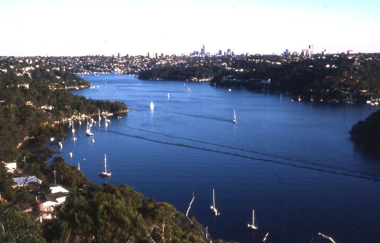 middle harbour, sydney